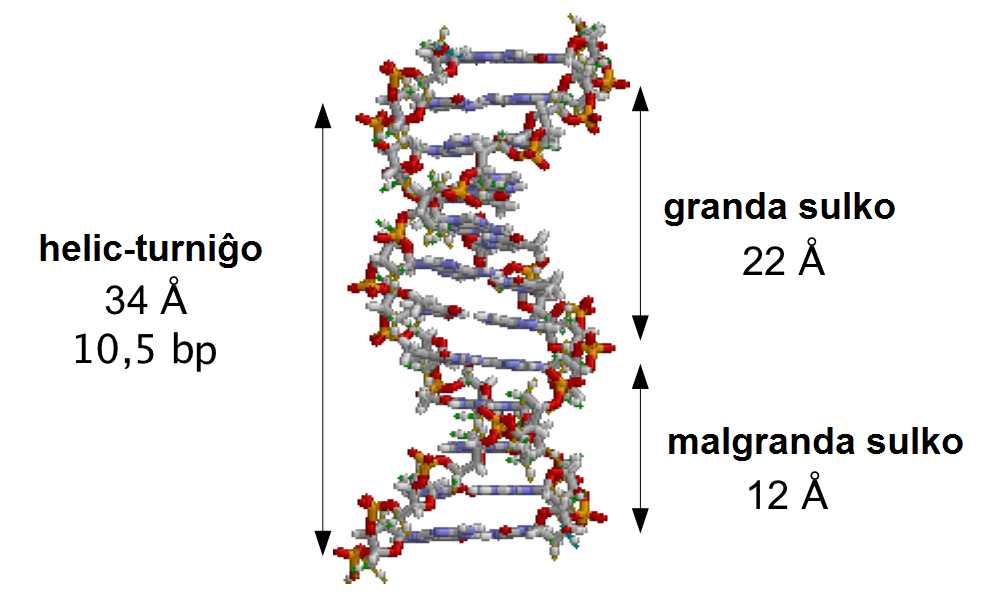 Granda kaj malgranda sulko en la duobla fadeno de DNA.